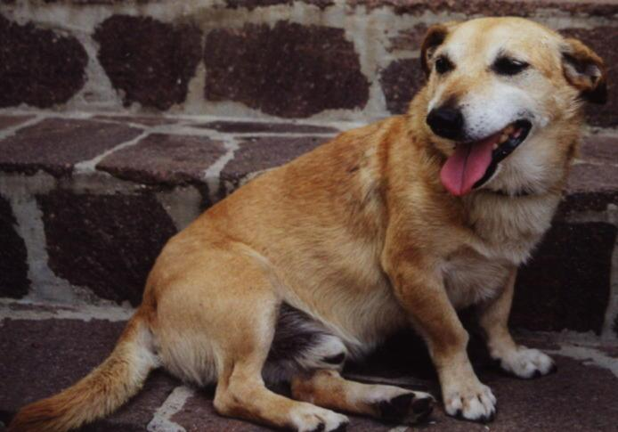 Cane